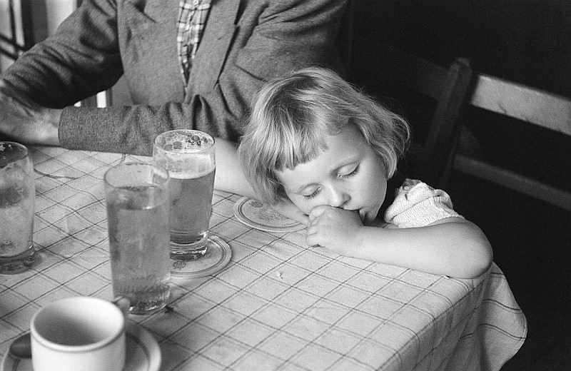 Original image description from the Deutsche Fotothek Porträt